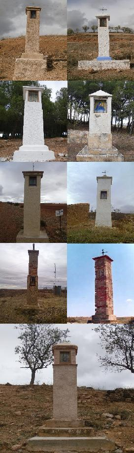 Peirones de Villar de los Navarros